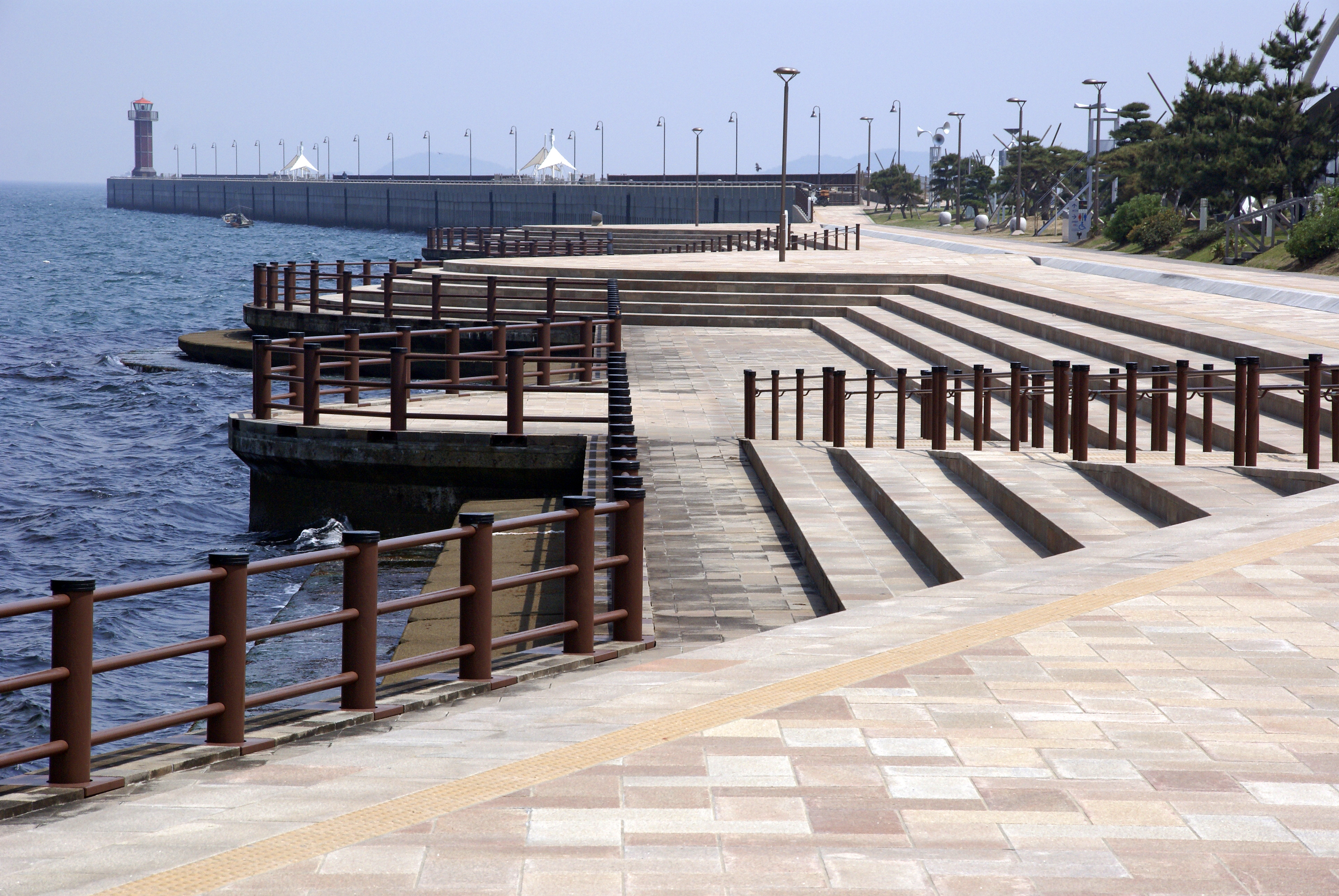 Seto-Sea-pallet in Sunport Takamatsu, Kagawa prefecture, Japan